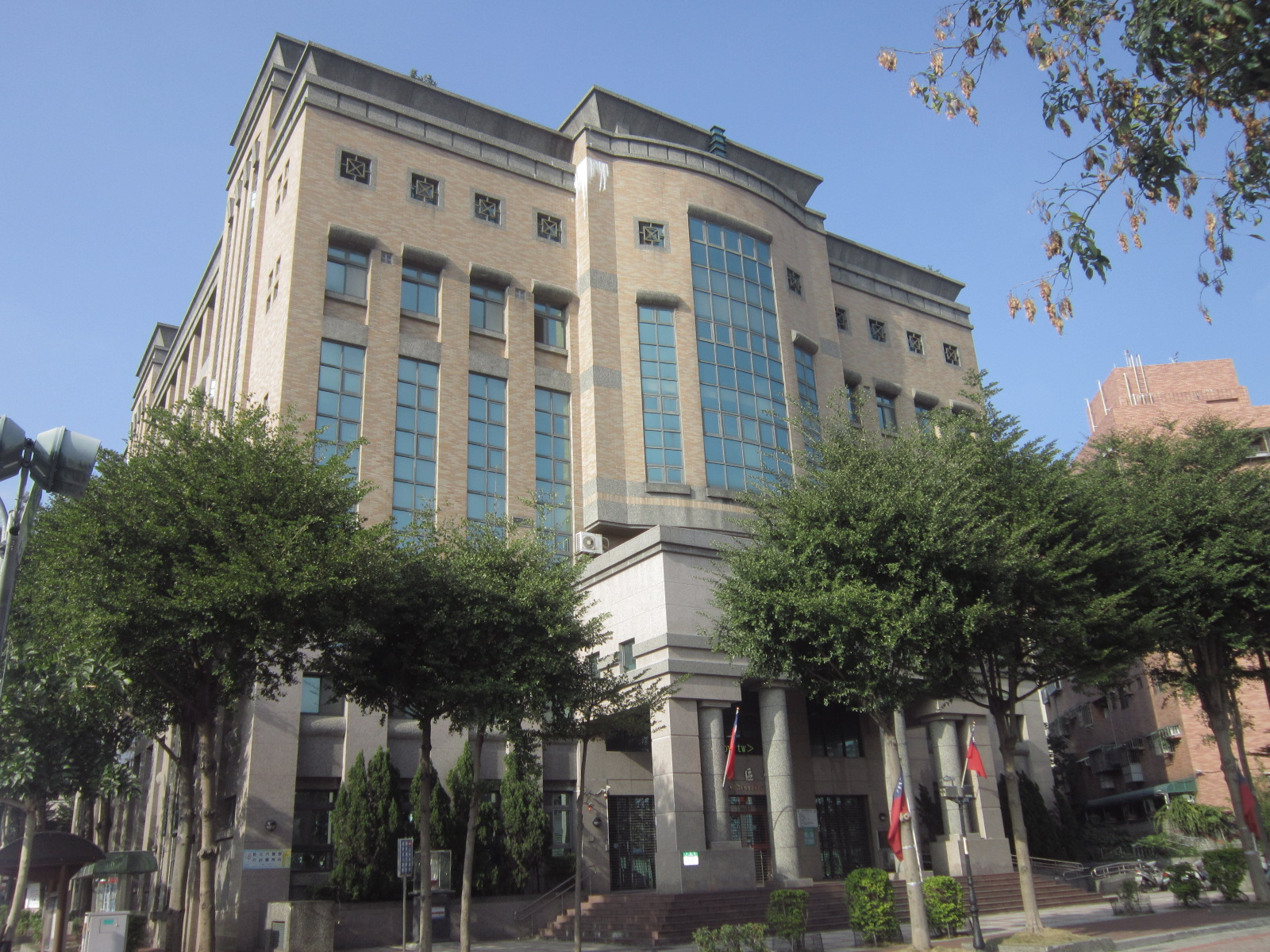 鶯歌區行政大樓，位於新北市鶯歌區仁愛路55號。